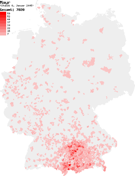 Verteilung des Nachnamens Mayr in Deutschland nach dem Telefonbuch mit Stand vom 6. Januar 2005 Source: selbst erstellt Ersteller: W. Baumgartner